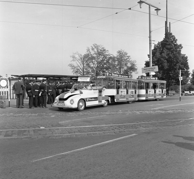 Bundesgartenschau 1961 Stuttgart 11.-16.9.1961